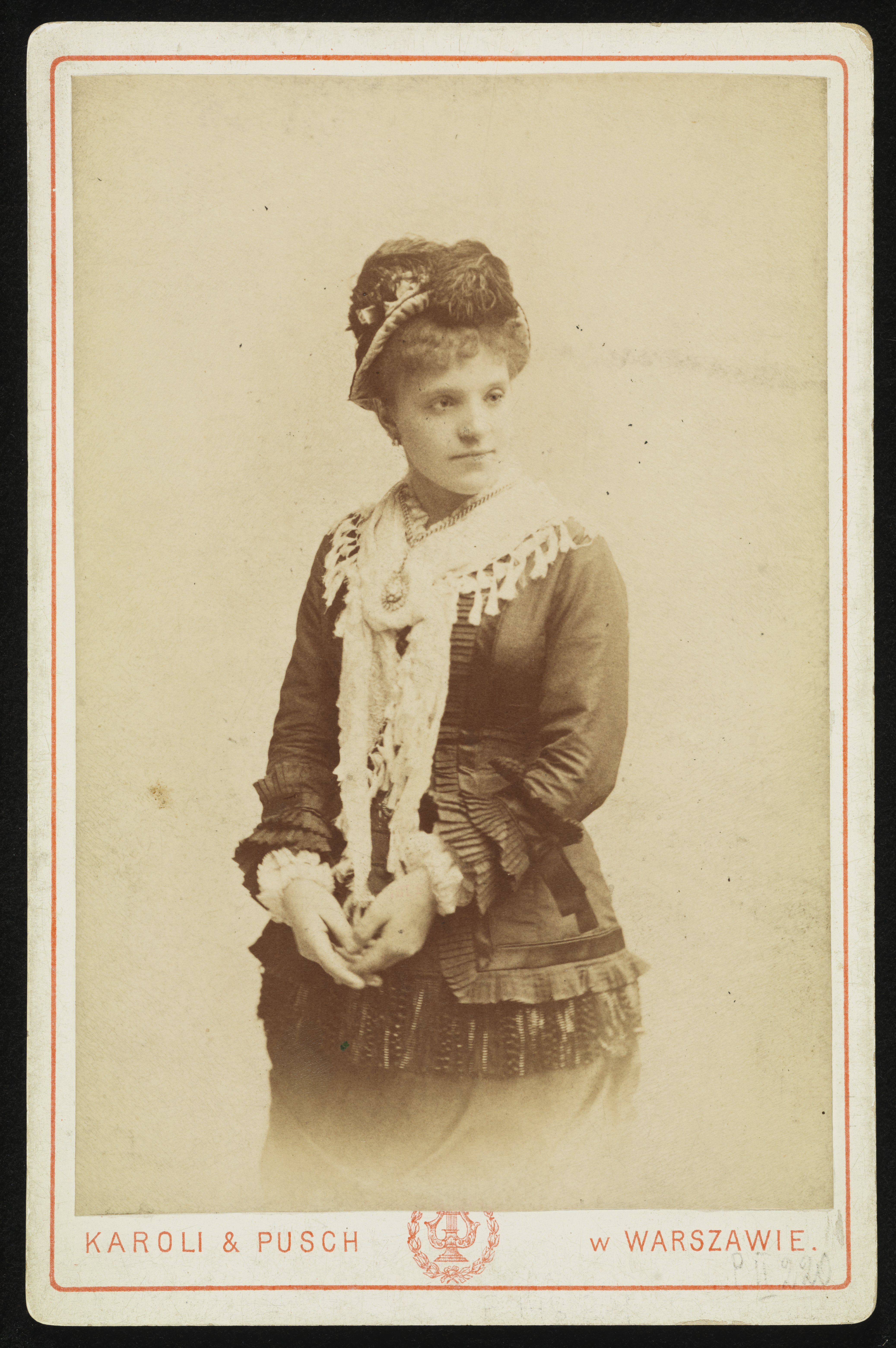 Portret Marcelli Sembrich-Kochańskiej, [ante 1890].